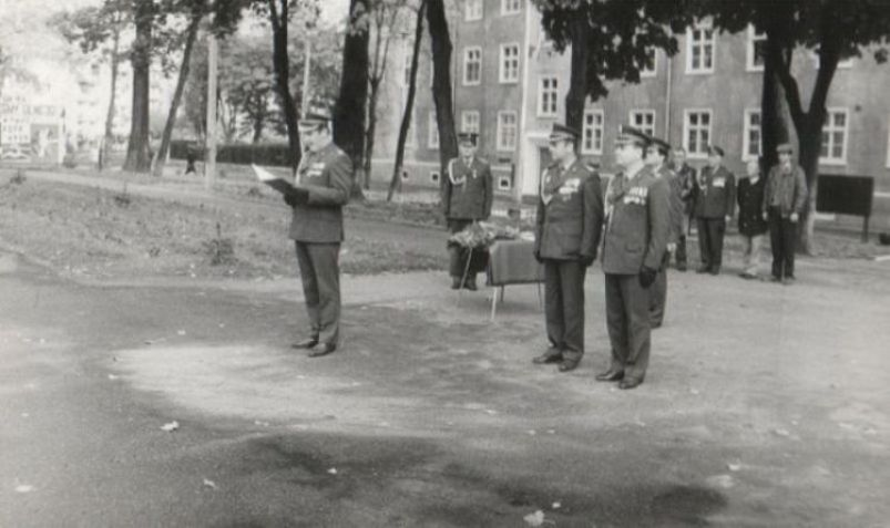 Stargard 1989r. Uroczystość w 12 batalionie medycznym. Czyta rozkaz mjr Edward Serejuk. Obok kwatermistrz 12DZ ppłk Filipiak i d-ca batalionu mjr Antoni Kalinowski.